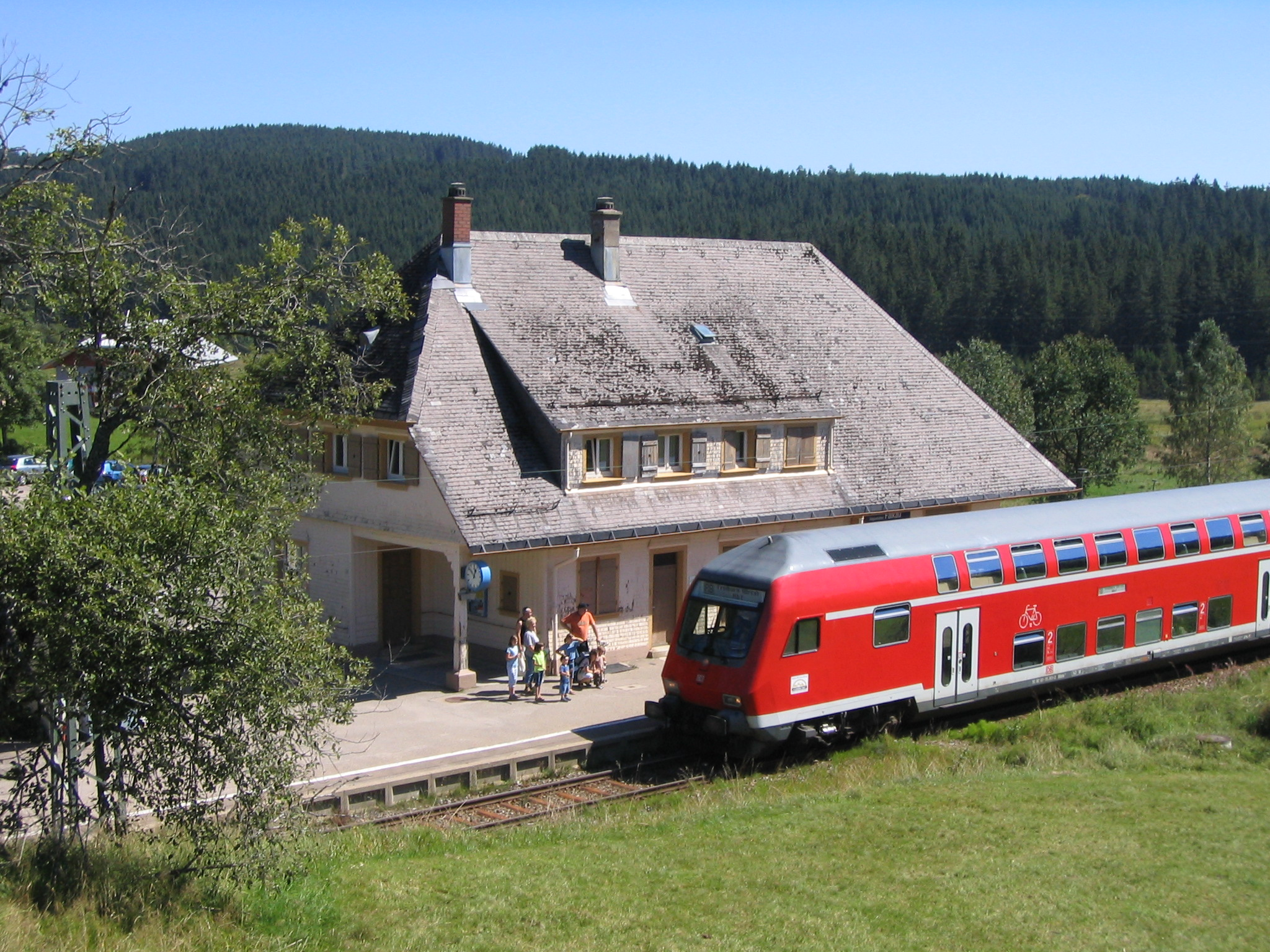 Doppelstocksteuerwagen auf der Dreiseenbahn im Bahnhof Altglashütten./Falkau